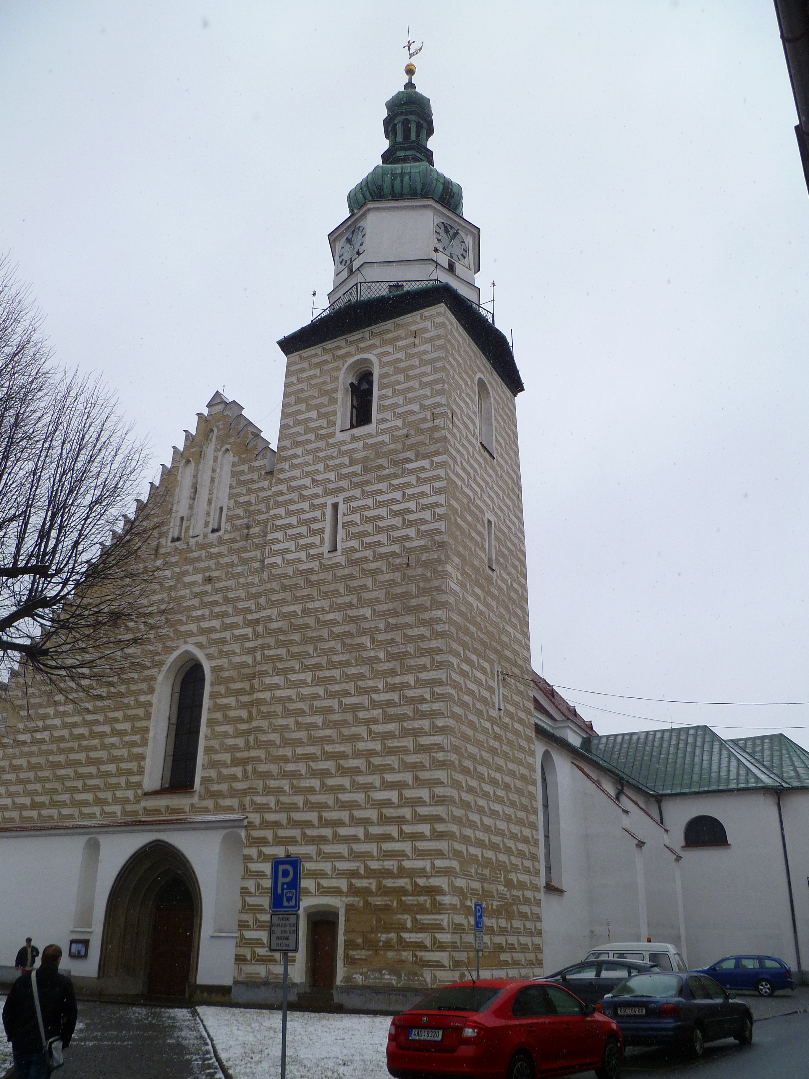 kostel